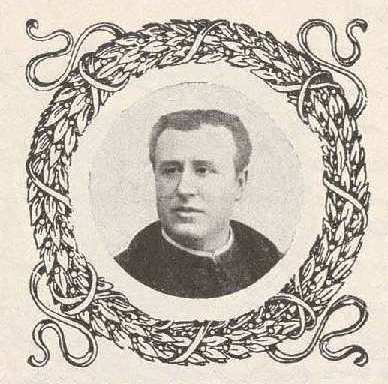 Luis Calpena y Ávila, Álbum de "Blanco y Negro". Españoles ilustres de principios del siglo XX, Madrid, 1904. Biblioteca Nacional de España